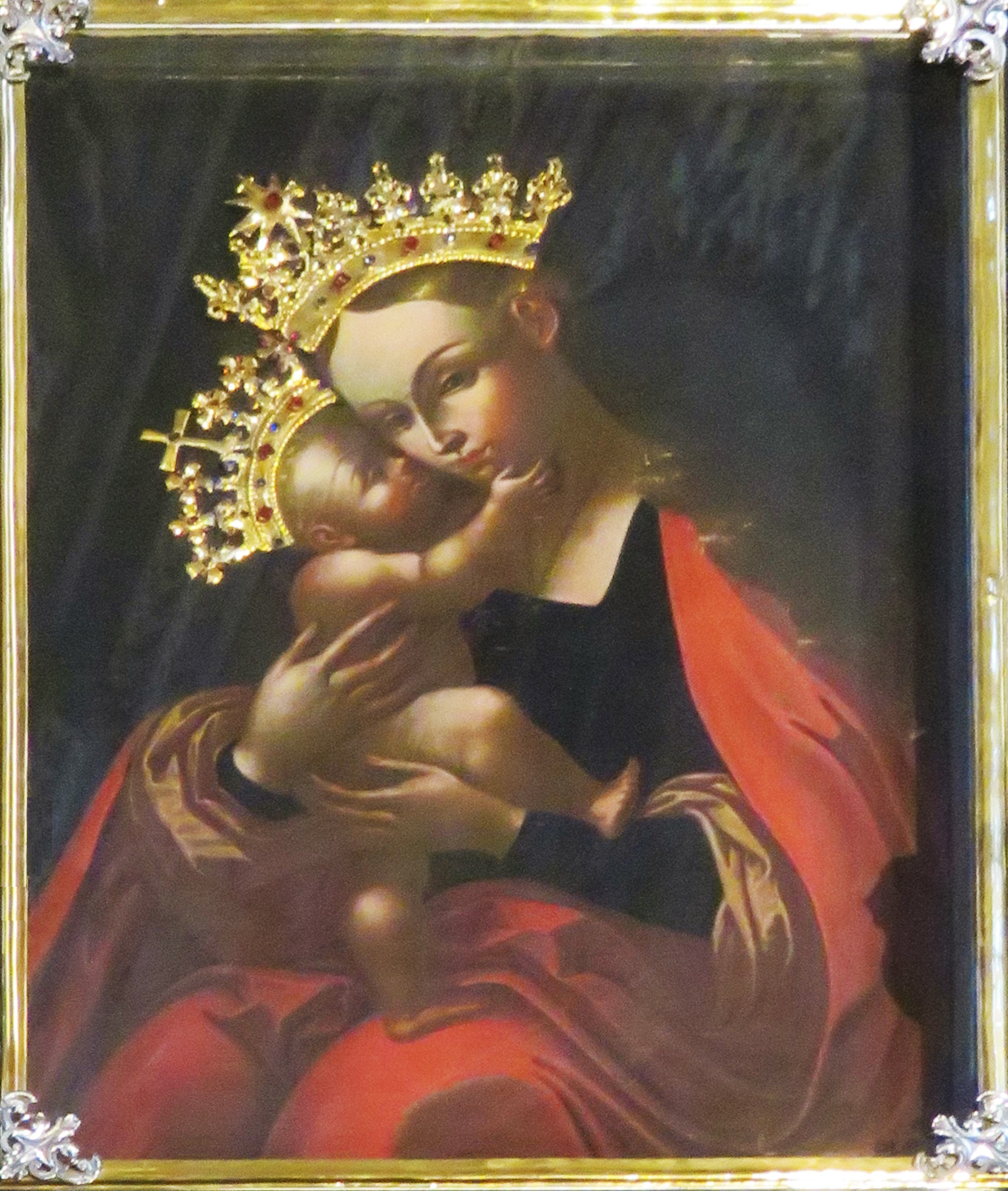 Immagine venerata di Maria Ausiliatrice, patrona della città di Rovereto